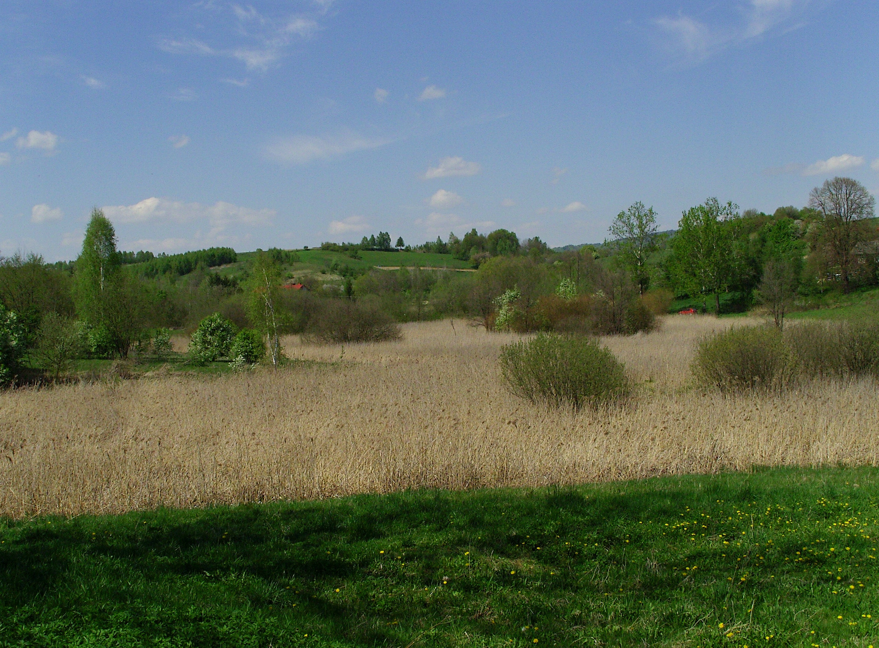 Szuwar trzcinowy nad Młynówką, Bączal Górny